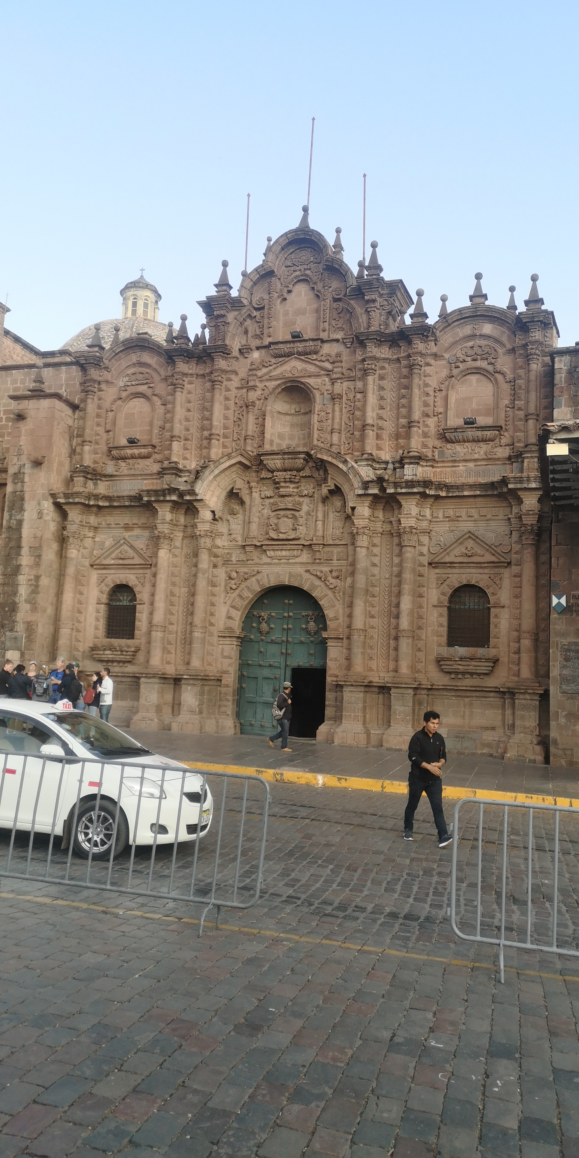 Vista de la puerta del antiguo local de la Universidad de San Antonio Abad del Cusco en la Plaza de Armas del Cusco, Perú